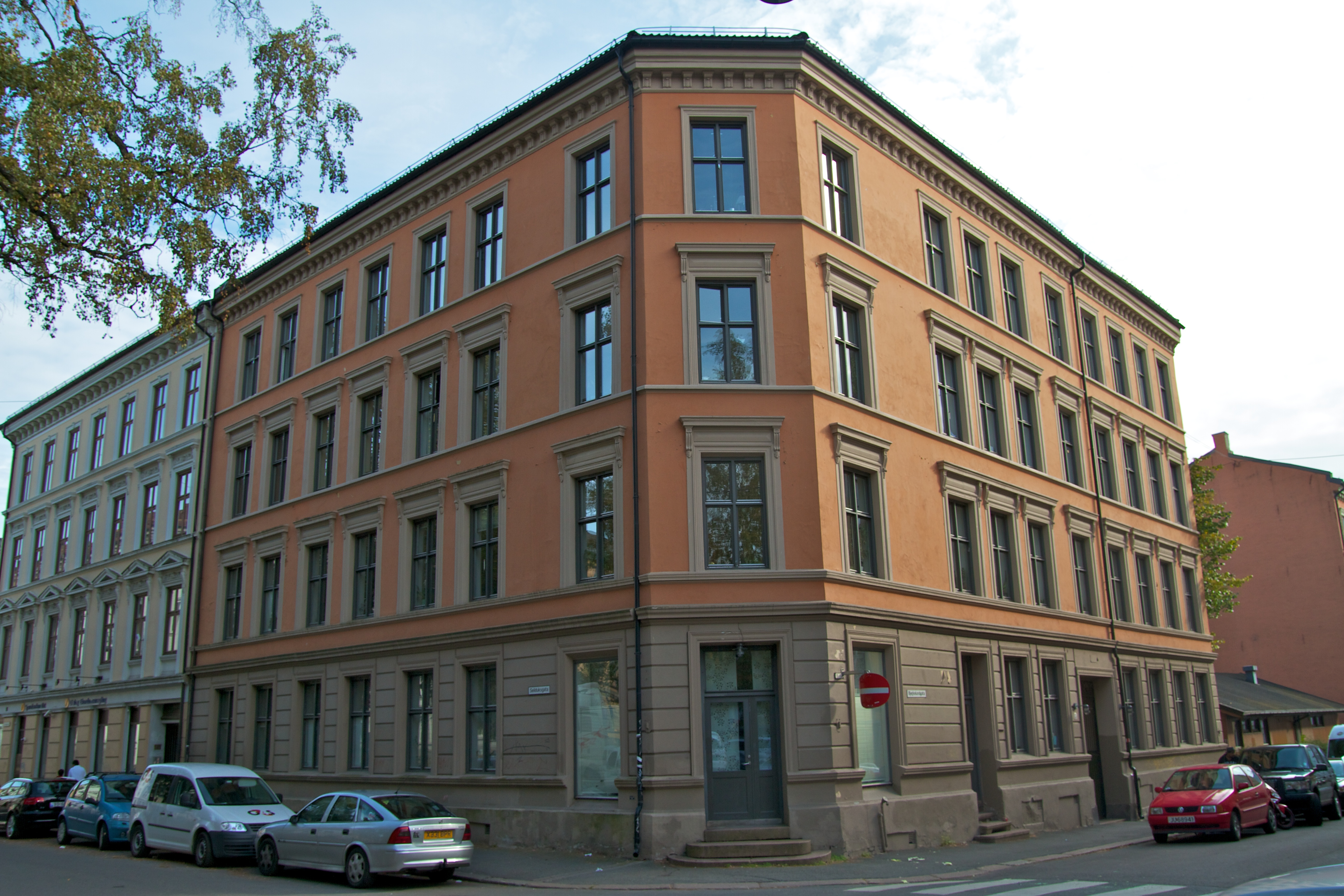 Bjerkelundgata 5 i Oslo.